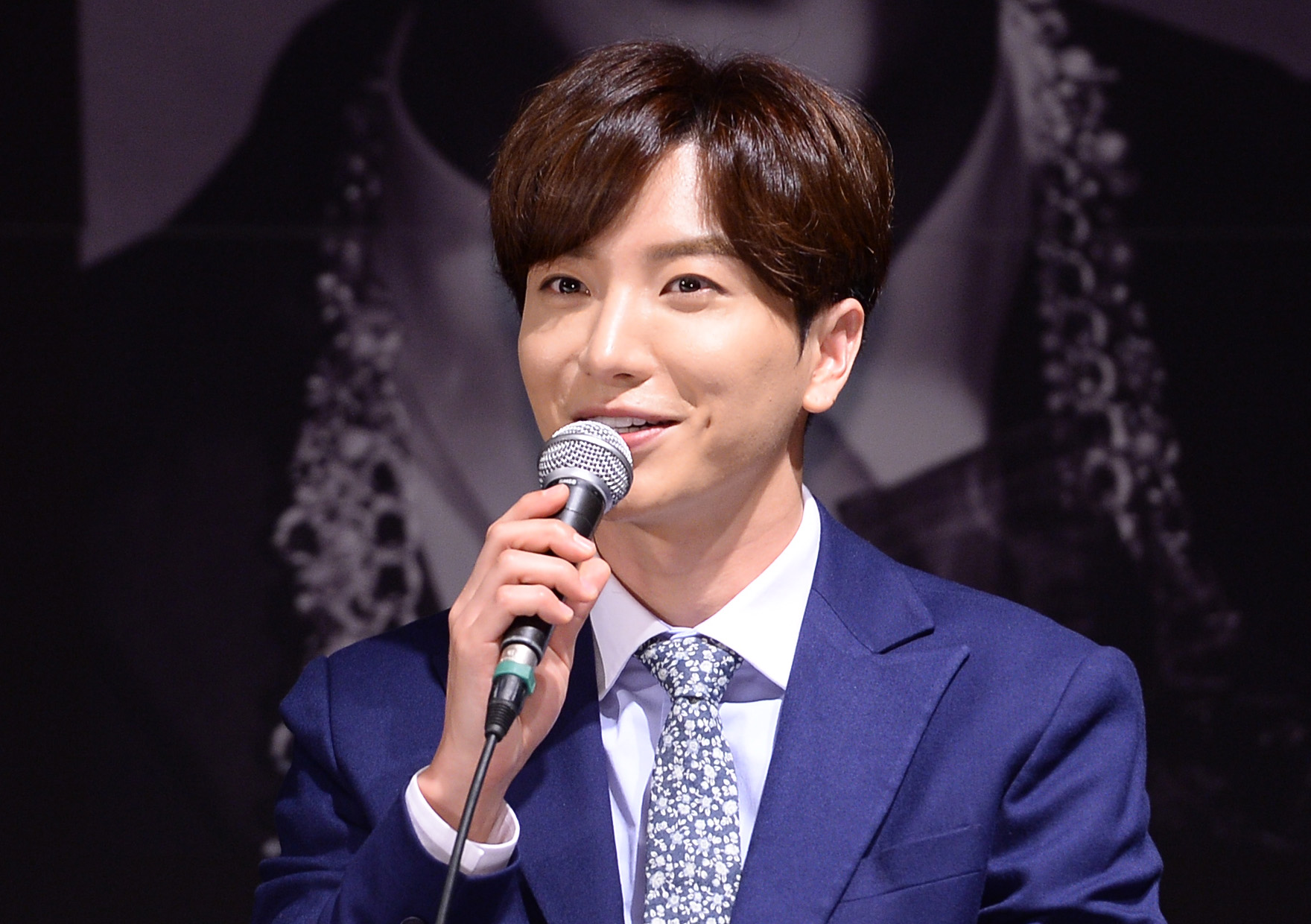 슈퍼주니어 멤버들이 15일 오후 서울 강남구 삼성동 코엑스 아티움에서 열린 스페셜 앨범 'Devil' 발매 기념 기자회견에서 인사를 하고 있다. 2015.07.15 / 이석우 기자